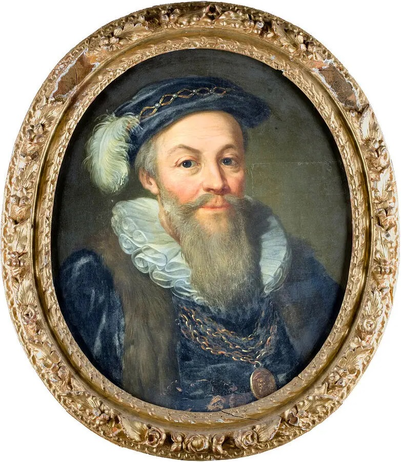 Erik Johansson Vasa